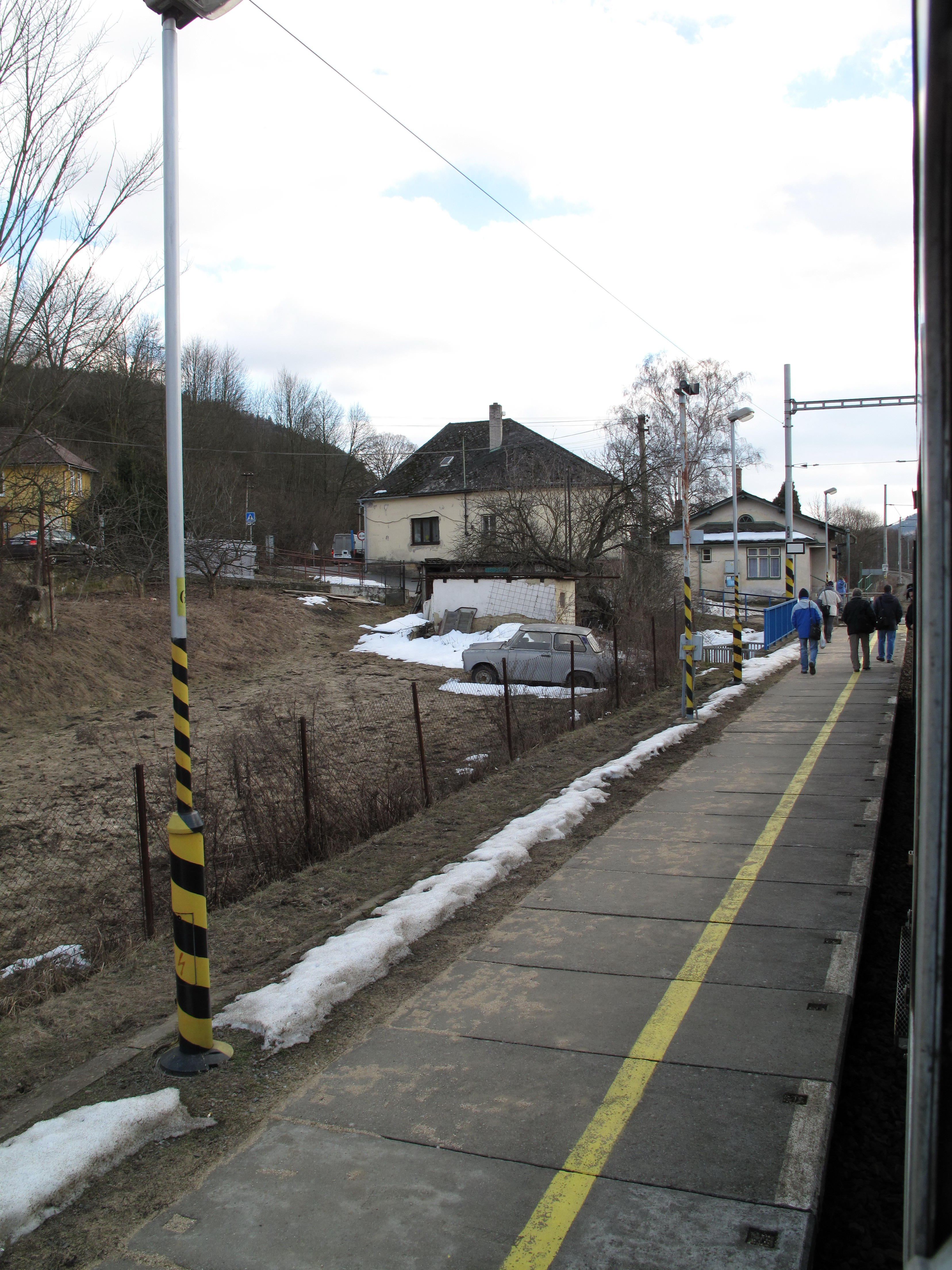 Železniční zastávka Rozhraní, trabant u železnice